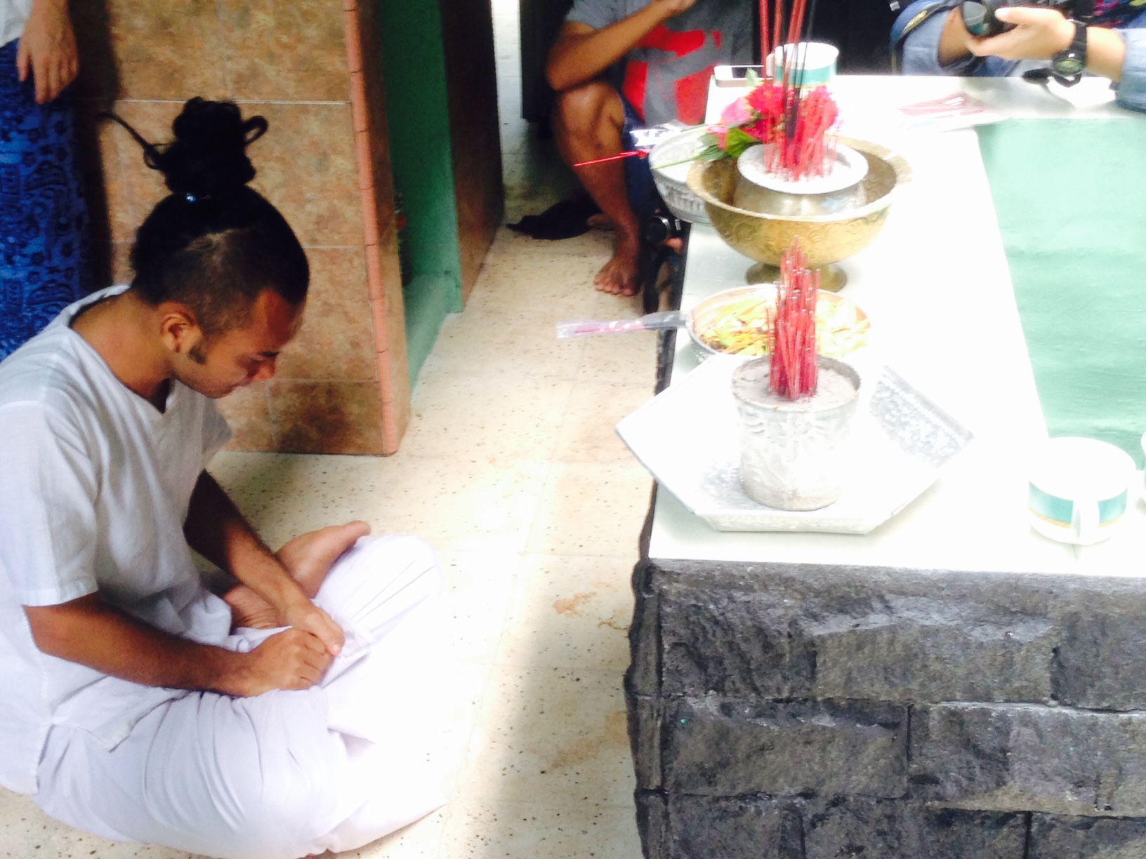 Wisata spiritual Sumur Sri Tanjung yang berada di Kampong Wisata Temenggungan menjadi salah satu bentuk wisata di kampung ini yang banyak diziarahi oleh tamu-tamu, baik dari lokal Banyuwangi, dari Indonesia, maupun dari mancanegara